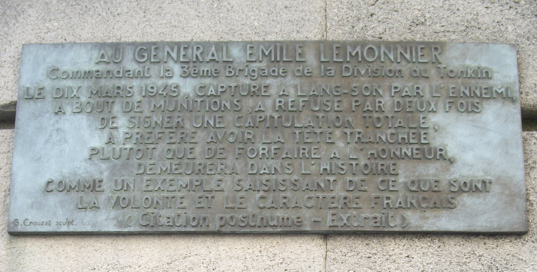 Plaque commémorative apposée à l'entrée de l'avenue du Général-Lemonnier, au débouché du quai des Tuileries, Paris 1er.« Au général Émile Lemonnier, commandant la 3e brigade de la division du Tonkin le 10 mars 1945, capturé à Lang San par l'ennemi, à bout de munitions, a refusé par deux fois de signer une capitulation totale, a préféré avoir la tête tranchée plutôt que de forfaire à l'honneur, demeurera dans l'histoire comme un exemple saisissant de ce que sont la volonté et la caractère français. Citation posthume - extrait. »